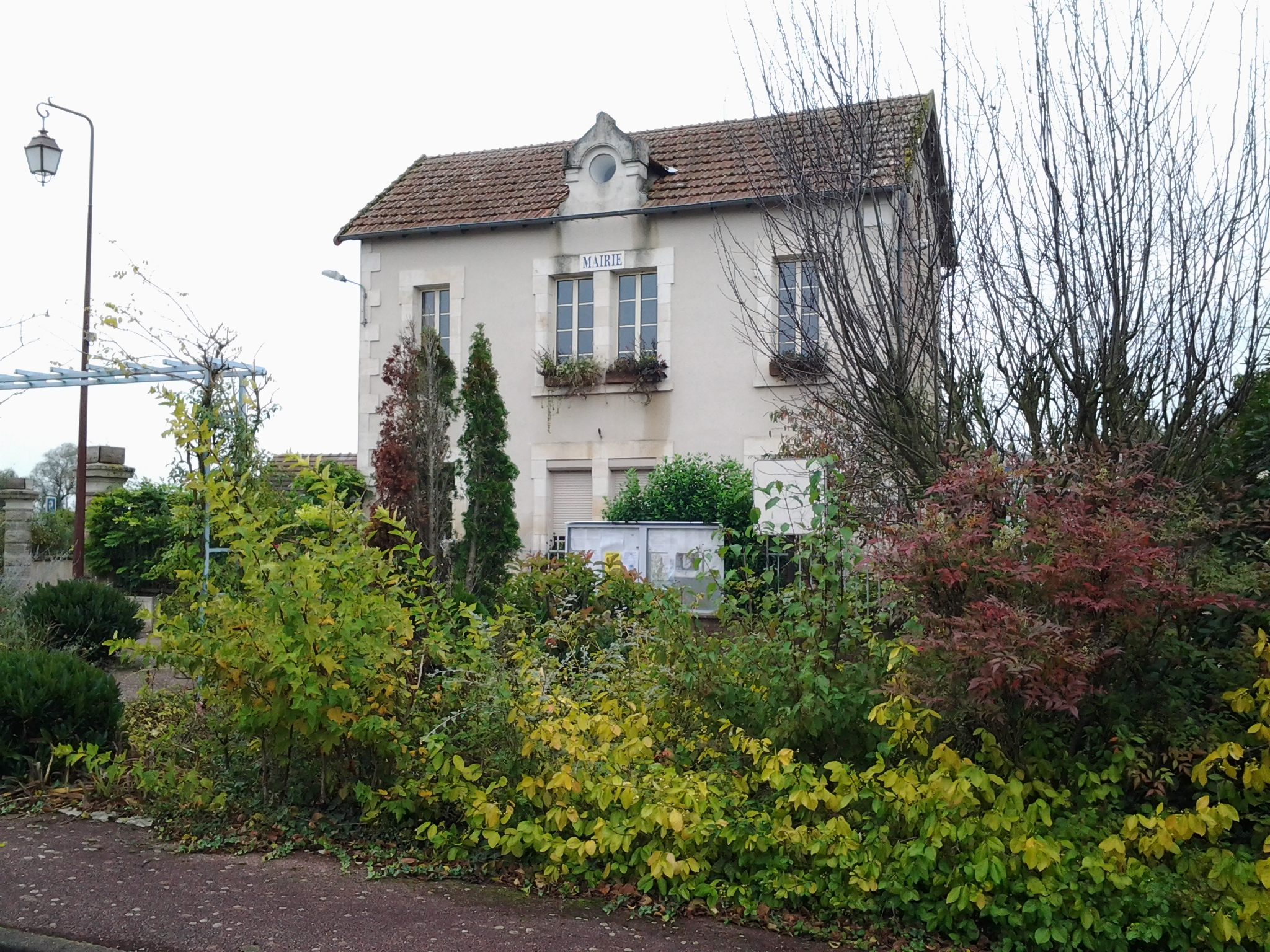 Une photo de la mairie d'Arcomps